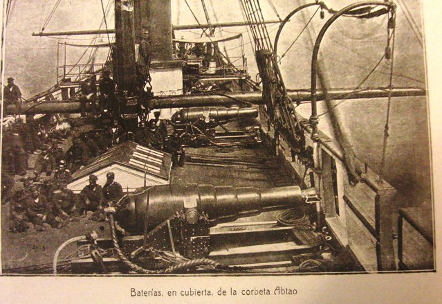 Fotografia de la bateria de la corbeta Abtao